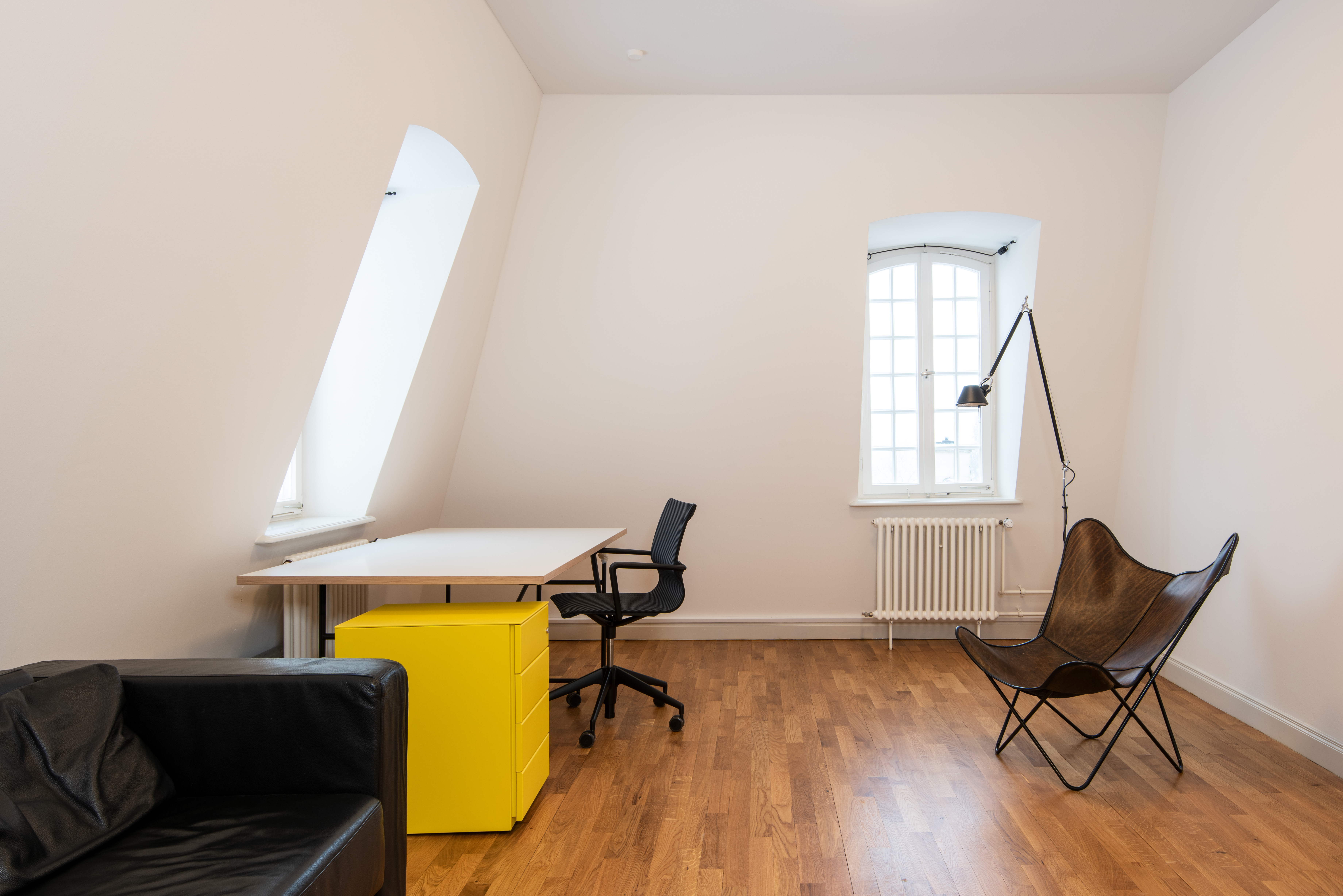 Studio der Akademie Schloss Solitude